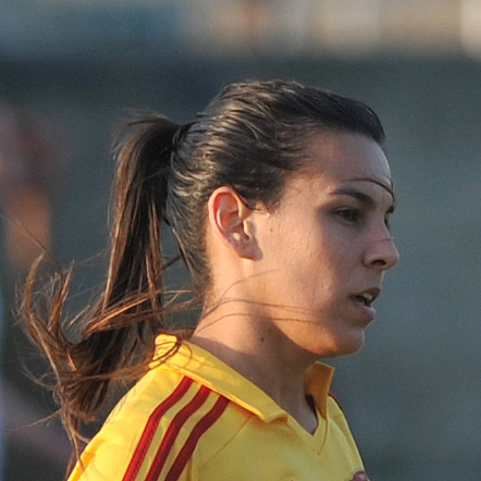 UEFA Women's Champions League 2013/14 SV Neulengbach - Tyresö FF Neulengbach, 29. März 2014 Thaisa Moreno